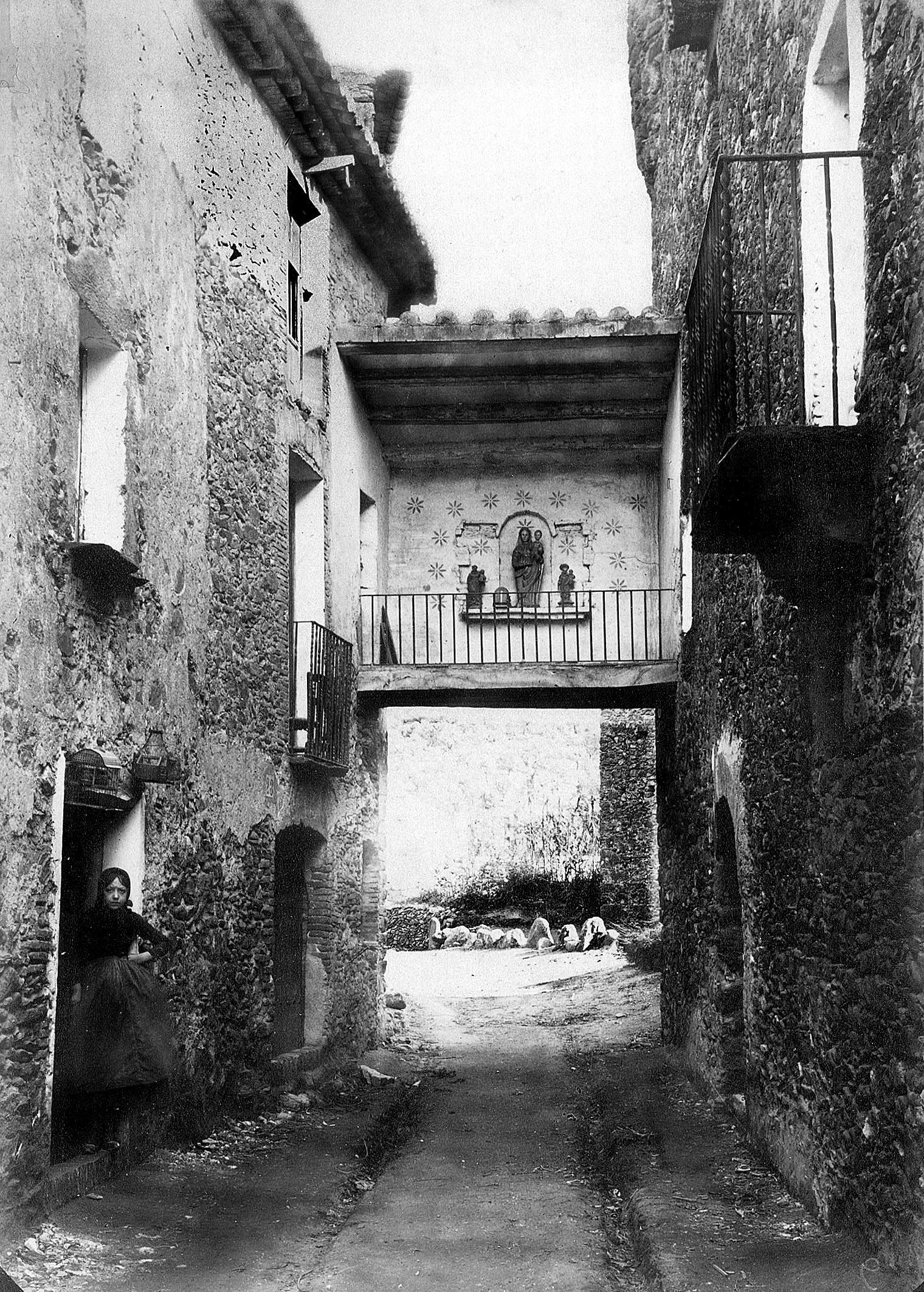 Vue d'une ruelle de Llançà (Alt Empordà, Catalogne) extraite de l'Album Rubaudonadeu qui comprend 555 photographies prises au cours de l'hiver 1888-1889 par le photographe catalan Josep Maria Cañellas (1856-1902).